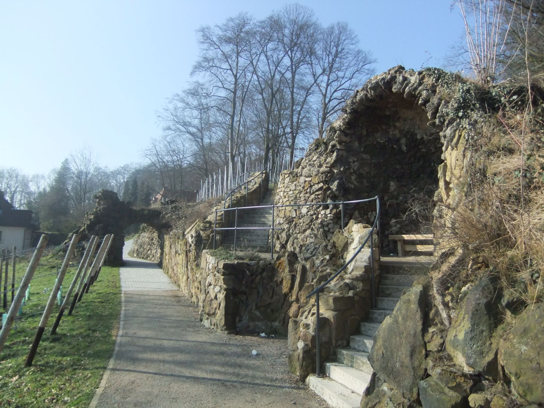 Nische im Winzerschen Garten Bielefeld.